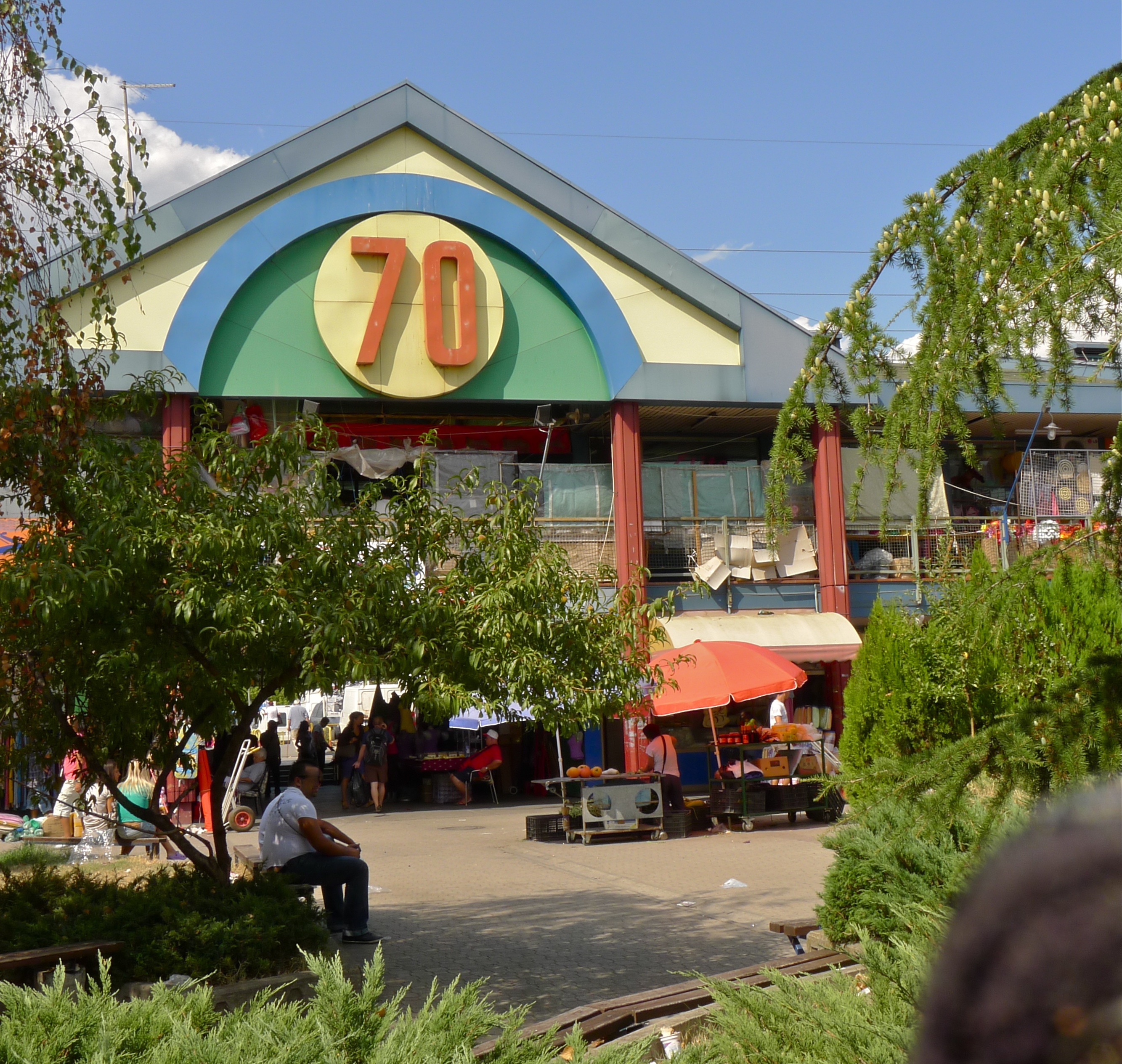 Кинески тржни центар - Блок 70